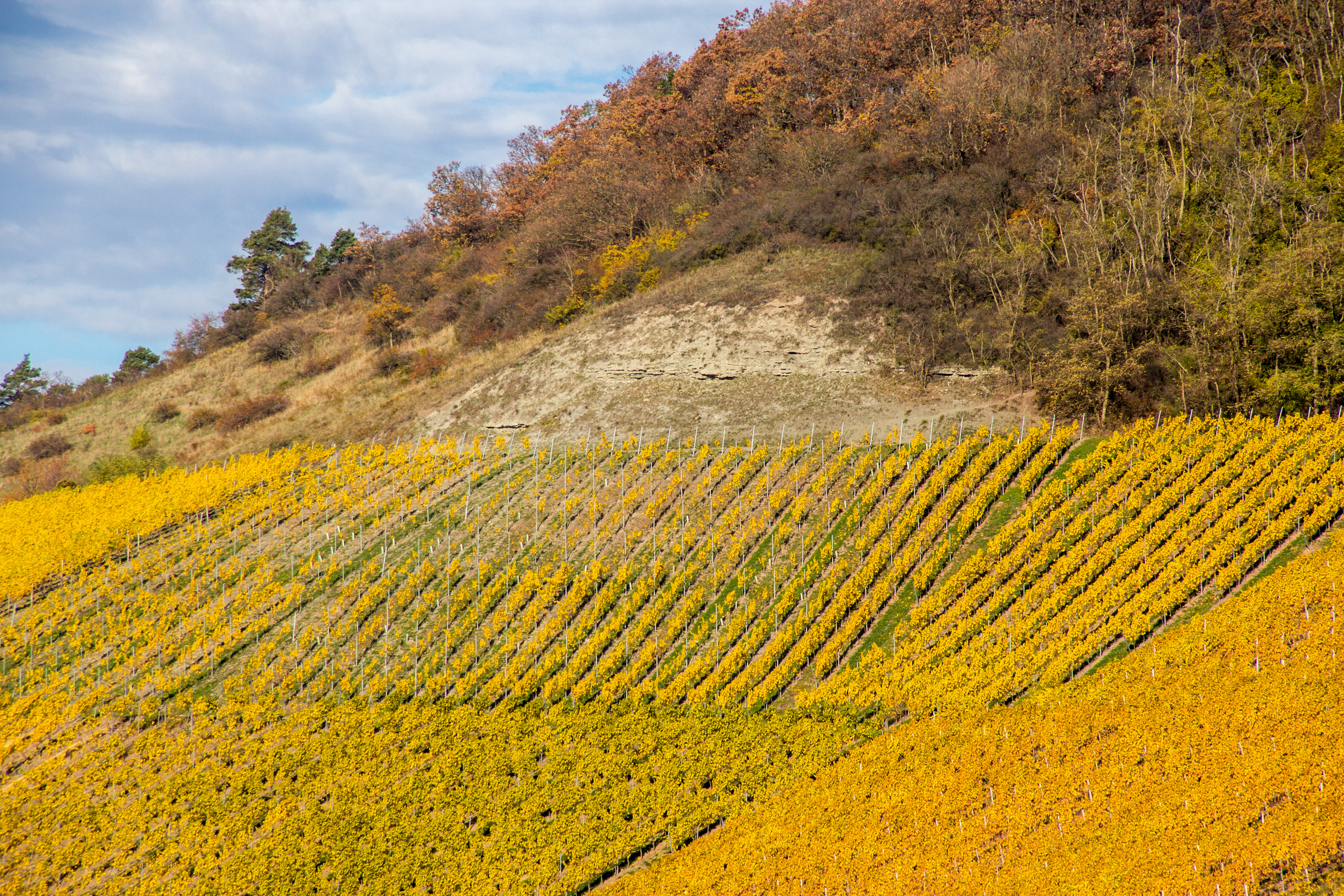 Aufschlüsse, Geotop, Iphofen, Tonmergelstein am Schwanberg